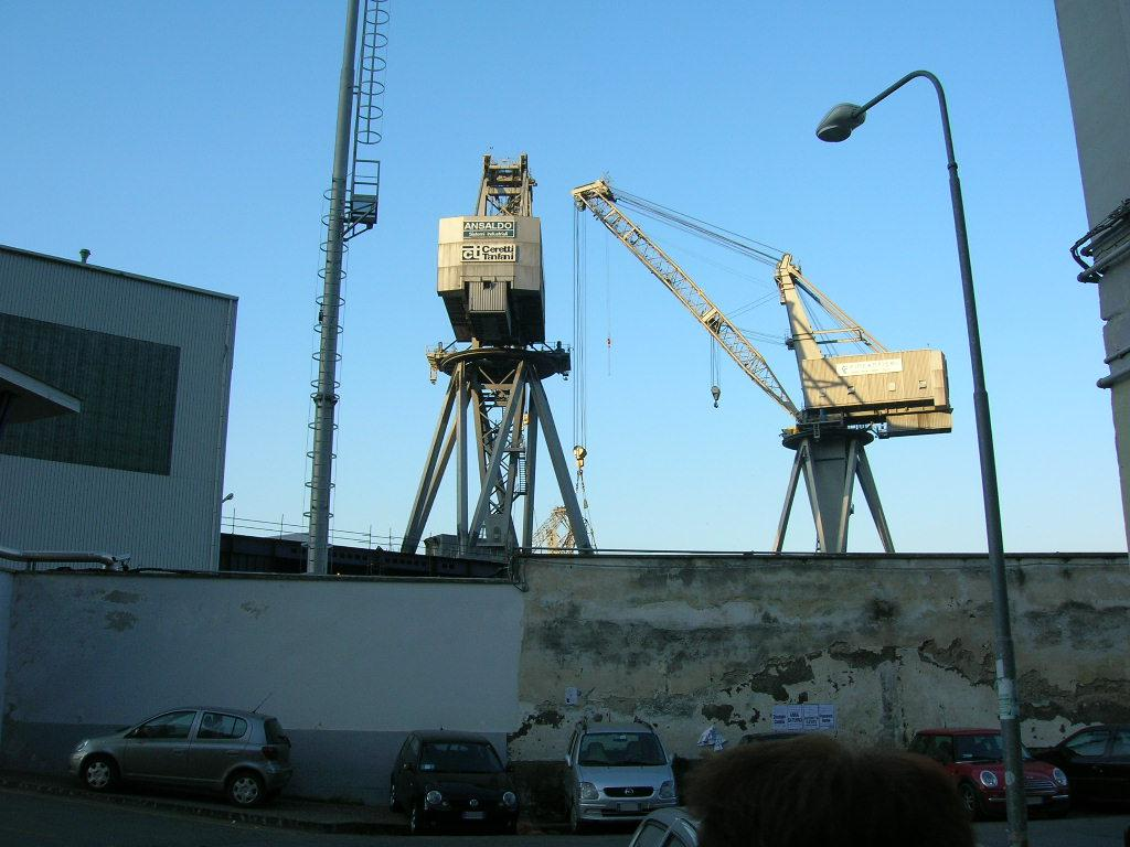 Le gru dei cantieri navali di Castellammare di Stabia